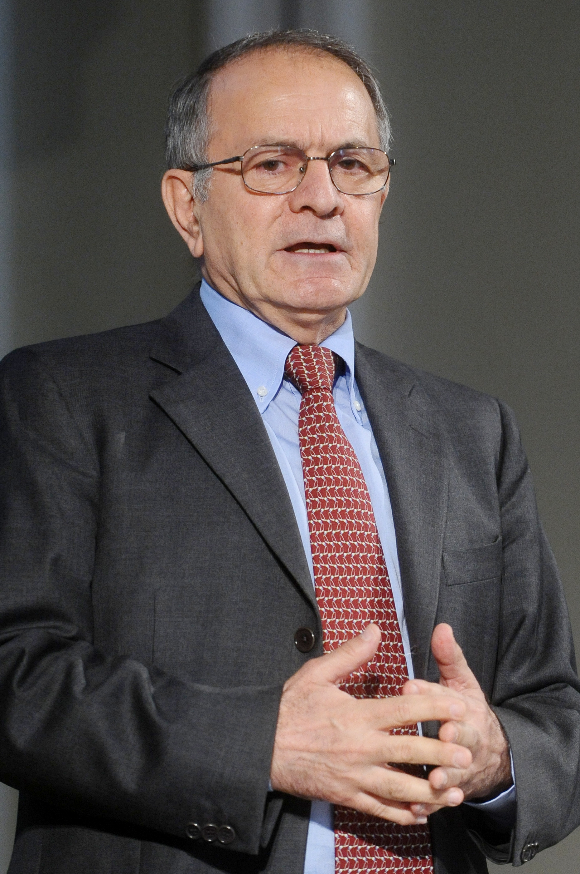 Emilio Gentile al Festival dell'Economia di Trento.